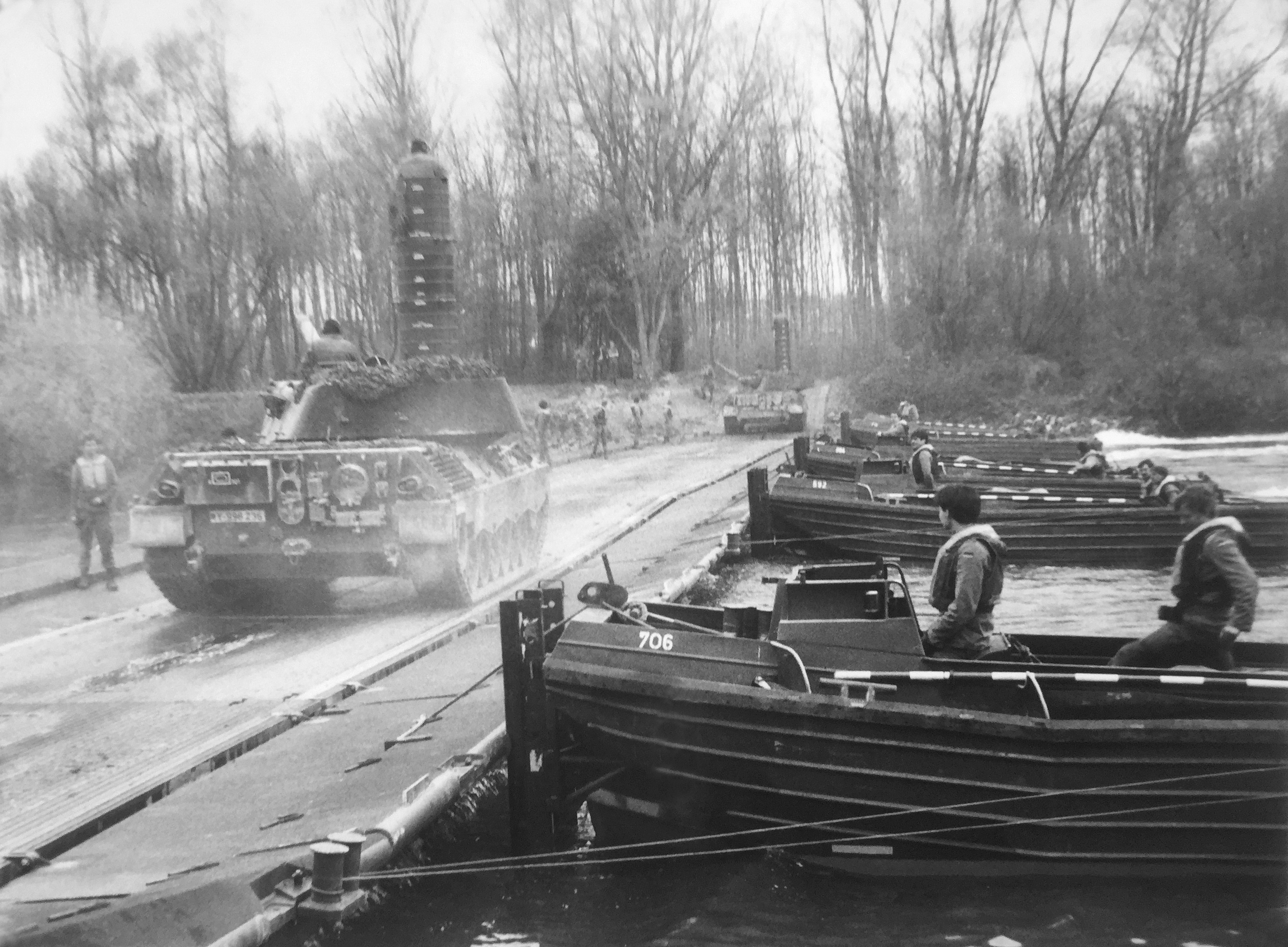 Faltschwimmbrücke der Bundeswehr 1983/84. PiBtl. 5/220L (Faltschwimmbrücke an der Brückenstelle Großmehring Donau/Ingolstadt)